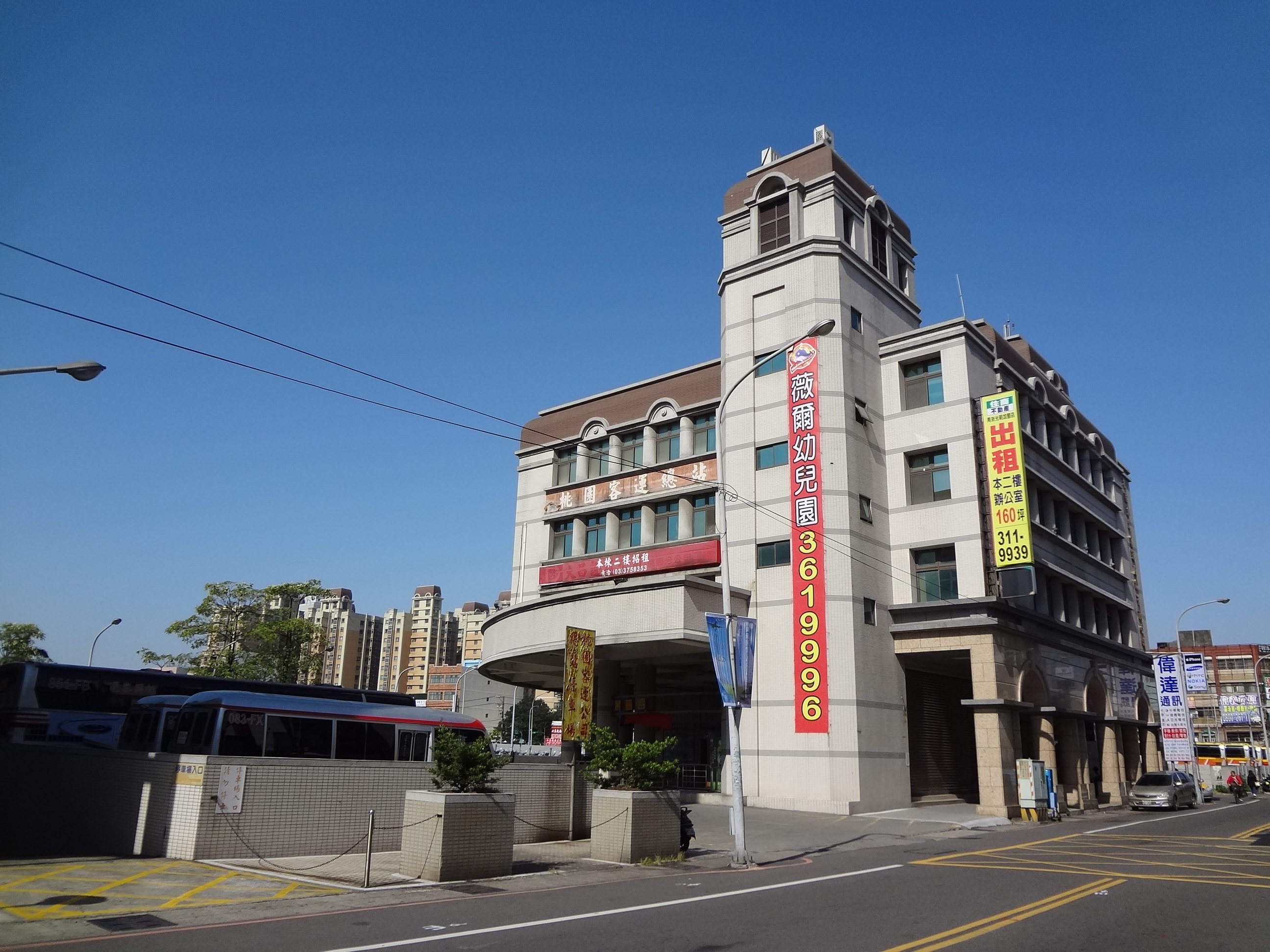 桃園客運總部，位於臺灣桃園縣桃園市延平路28號。